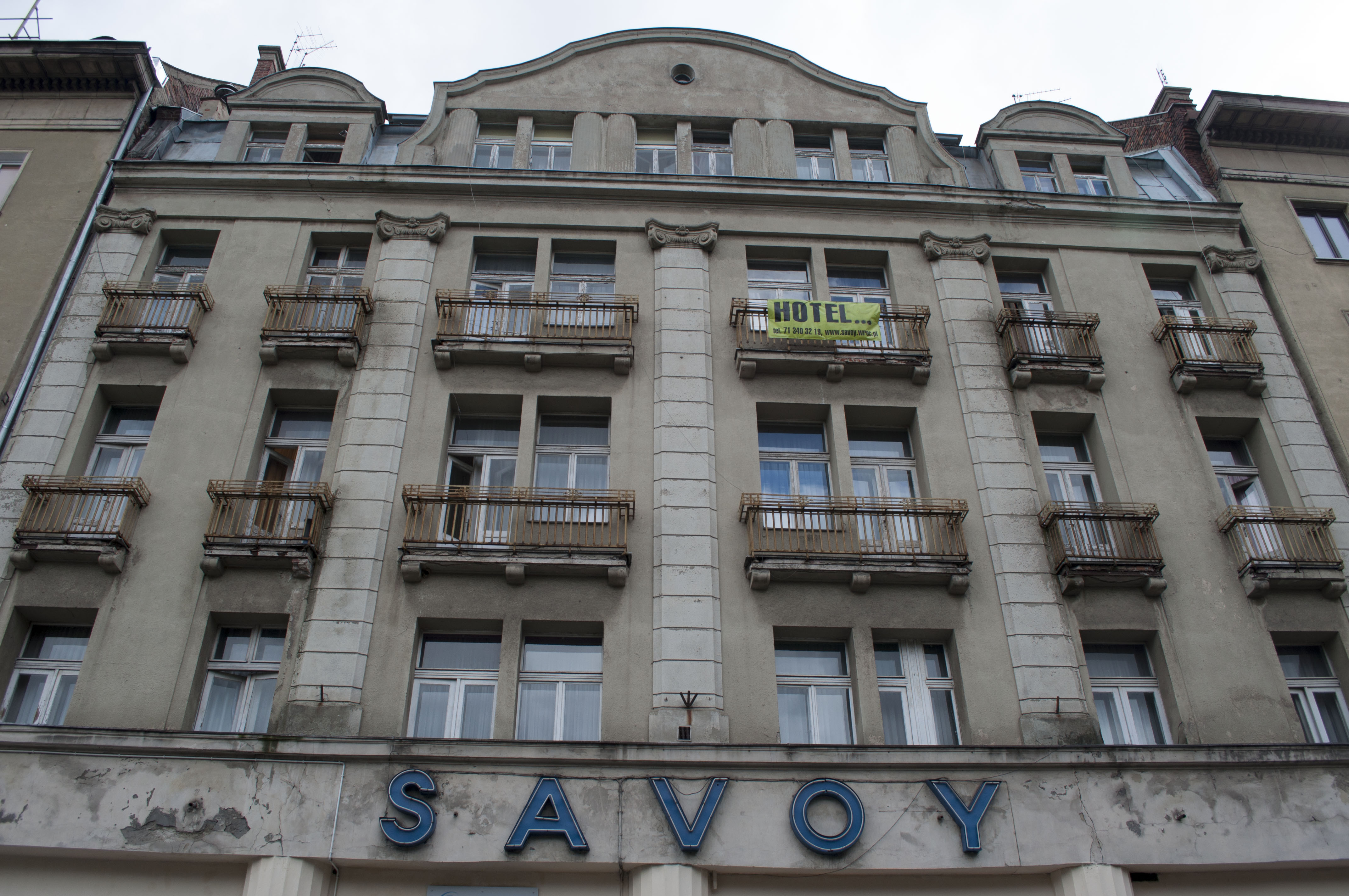 Klubhaus "Savoy", pl. Kościuszki 19 (bis 1945 Savoy-Hotel am Tauentzienplatz, Südseite, westlich der früheren Neuen Schweidnitzer Strasse), Breslau, Niederschlesien, Polen.